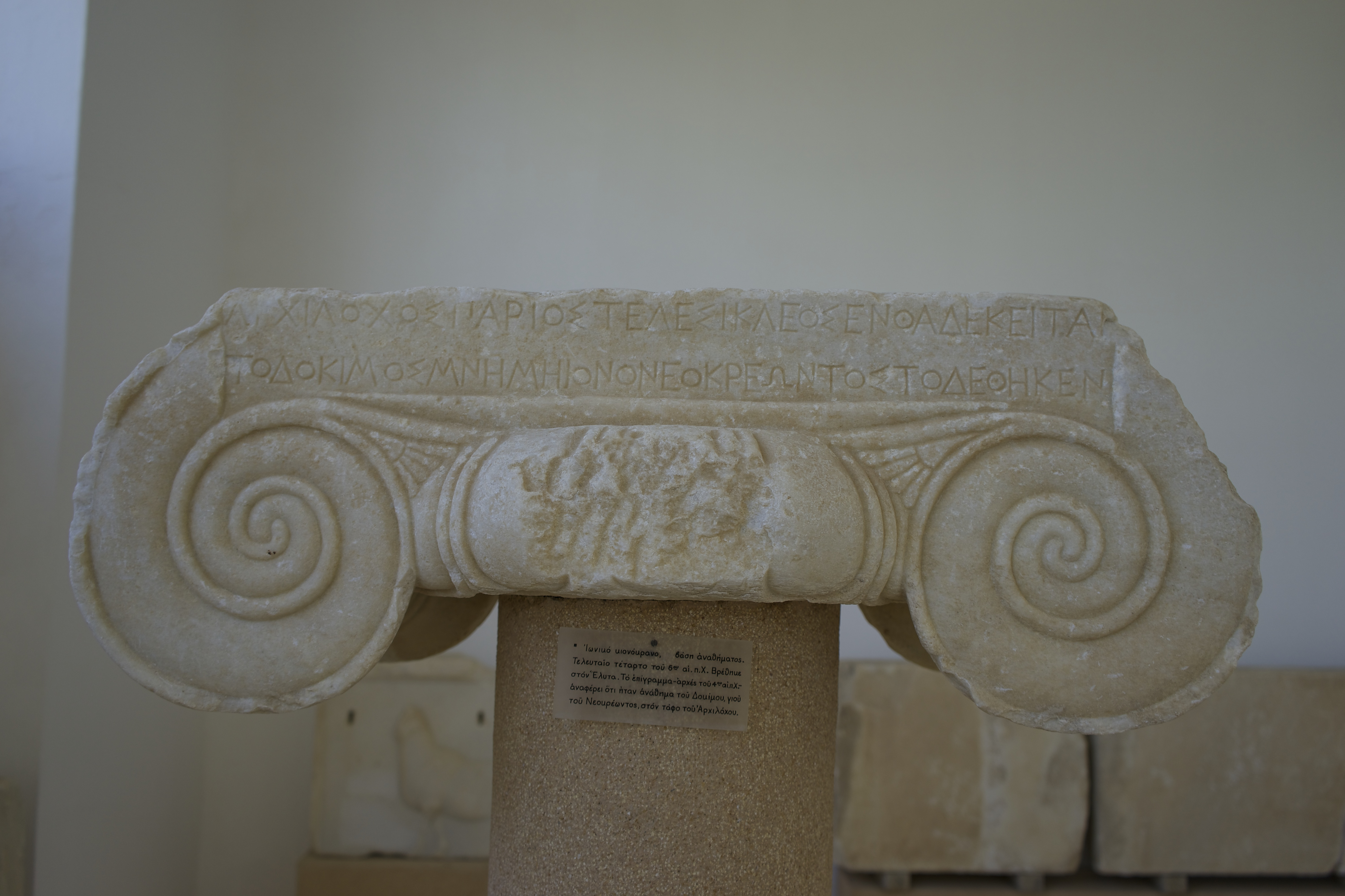 Ionic capital from the grave of Archilochus, Paros Archaeological Museum